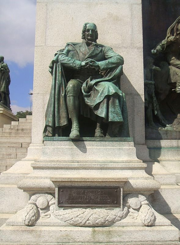 Estátua de José Bonifácio, no Monumento à Independência, Ipiranga, São Paulo, Brasil.